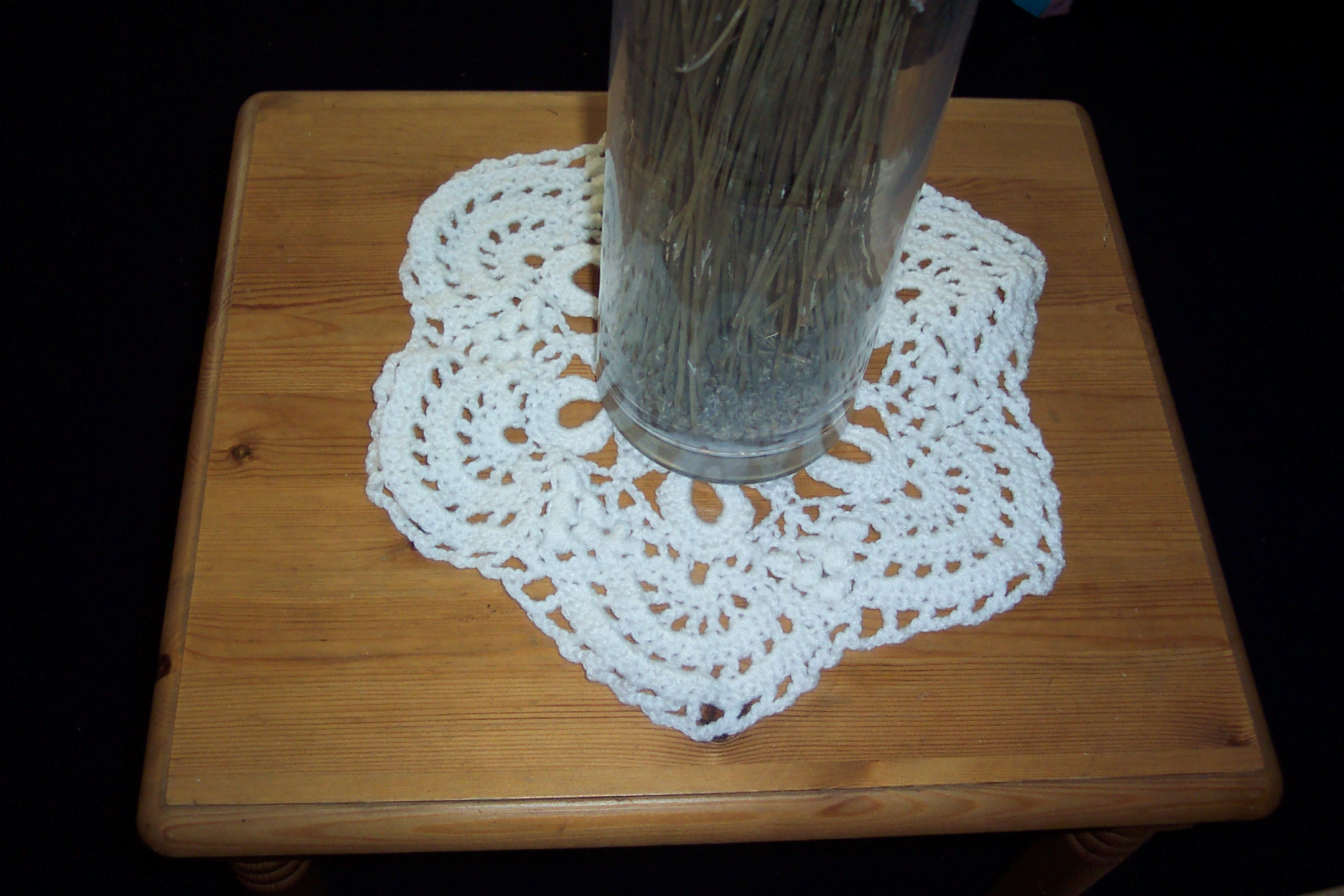 Exemple de napperon (crocheté par mes soins, s'il vous plait)